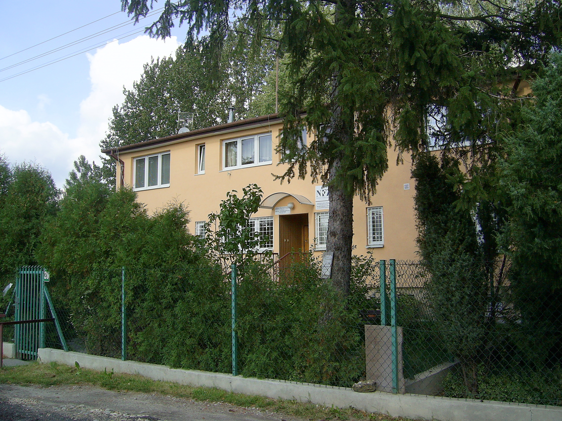 Przychodnia w Głoskowie-Letnisku